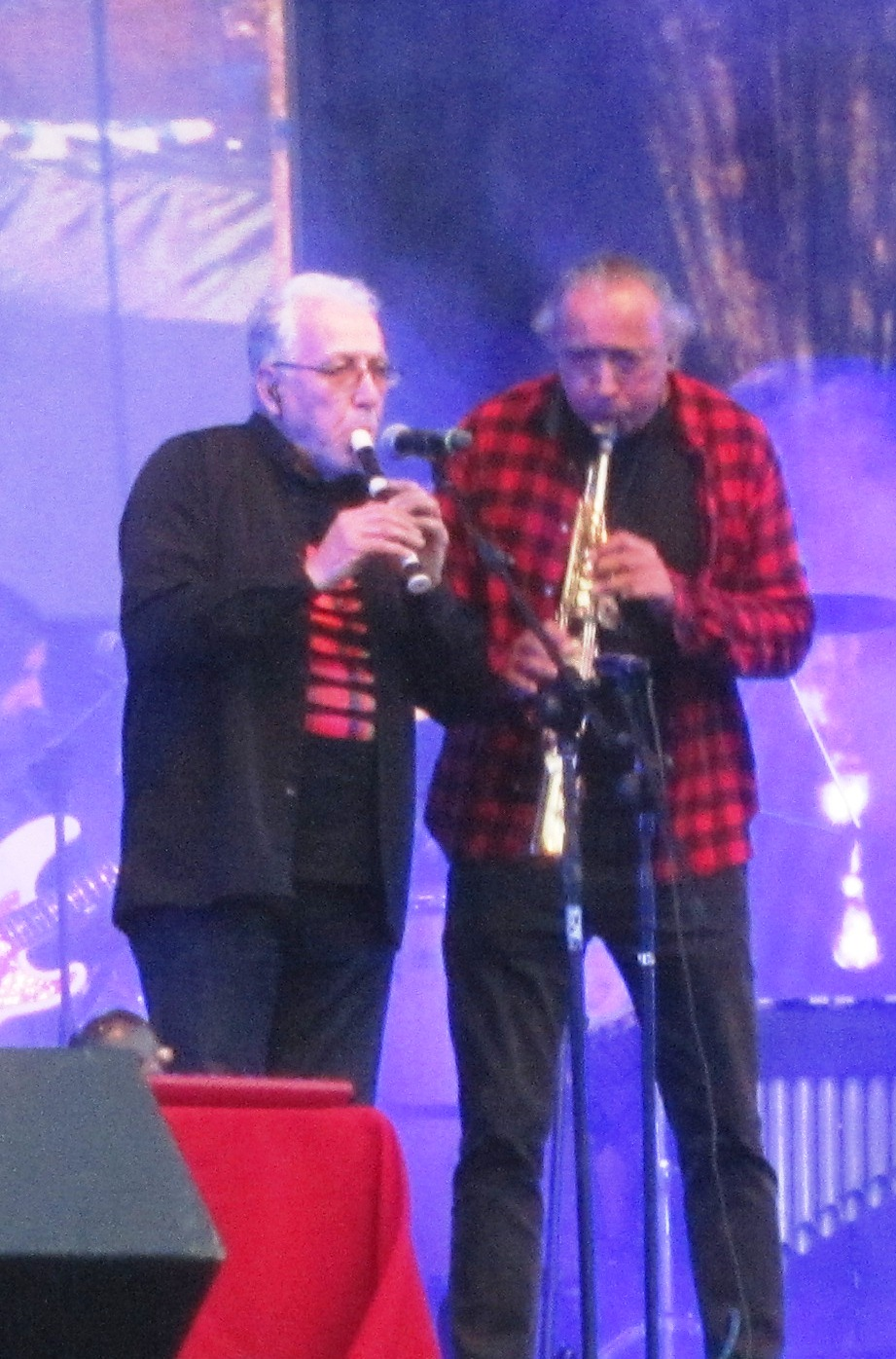 Congreso en el Rockodromo 2017